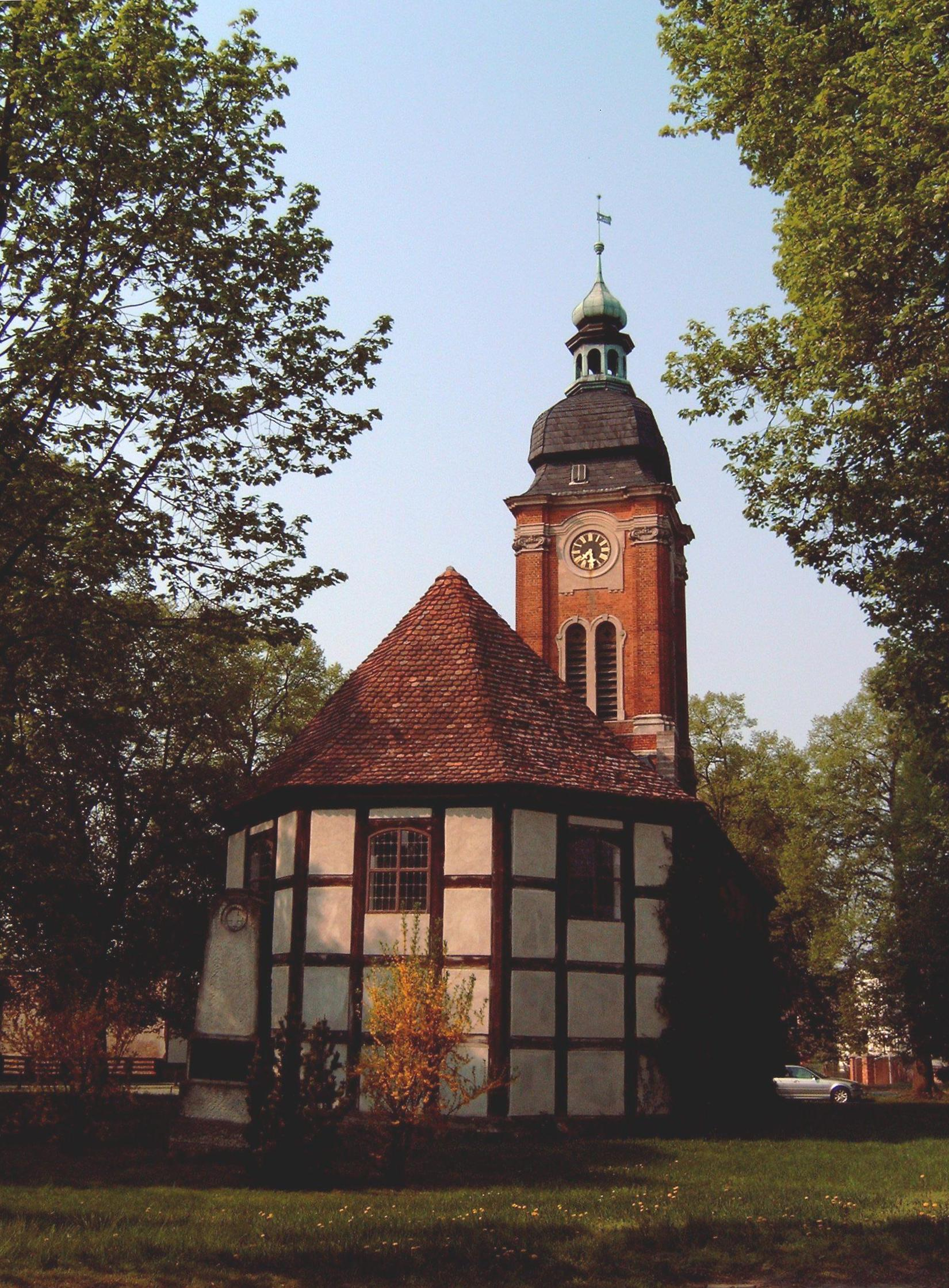 Kirche in Ferchesar